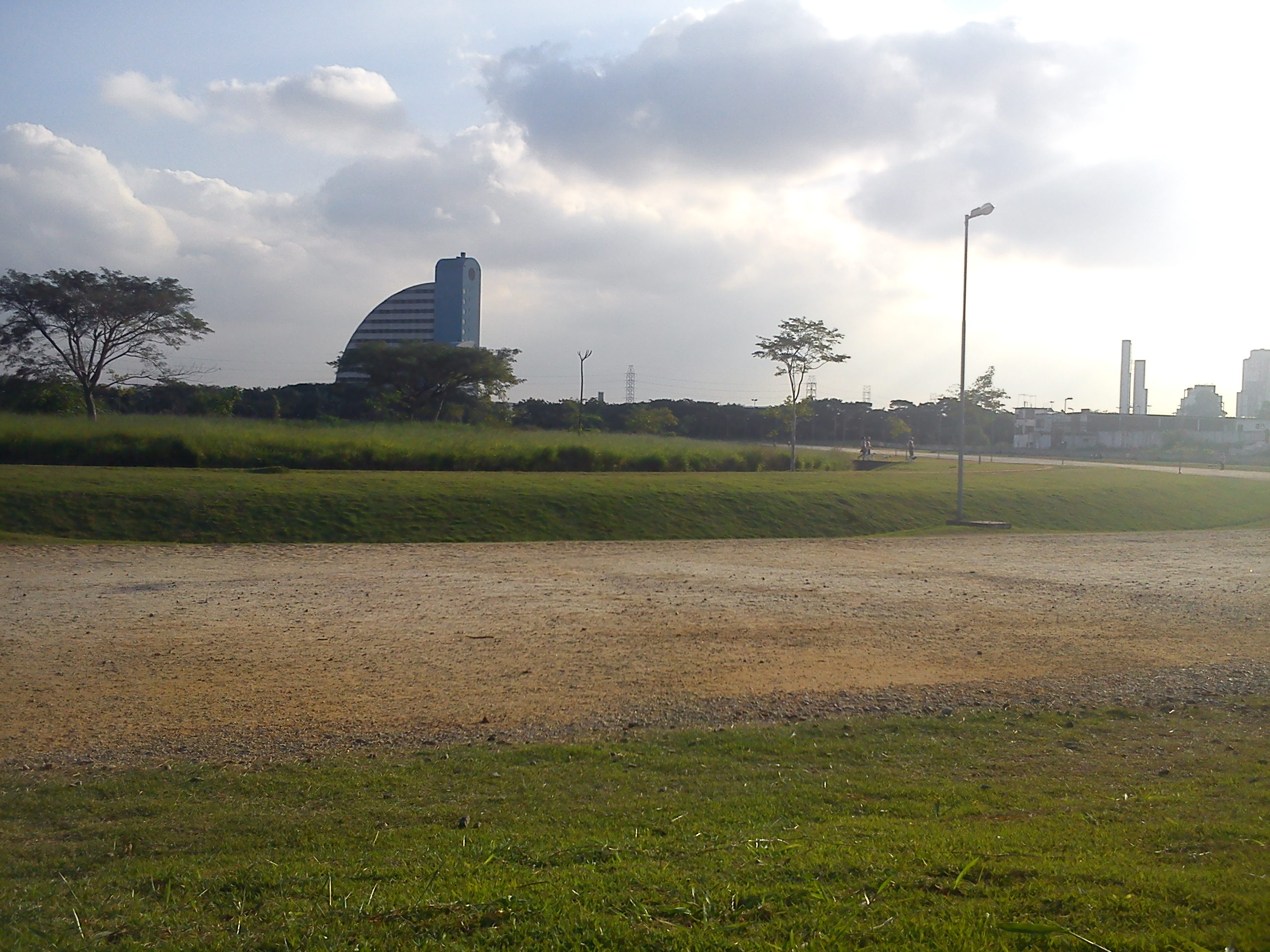 Pista de trote do Parque Vila Guilherme-Trote, antes pista da da Sociedade Paulista de Trote, em 2011.